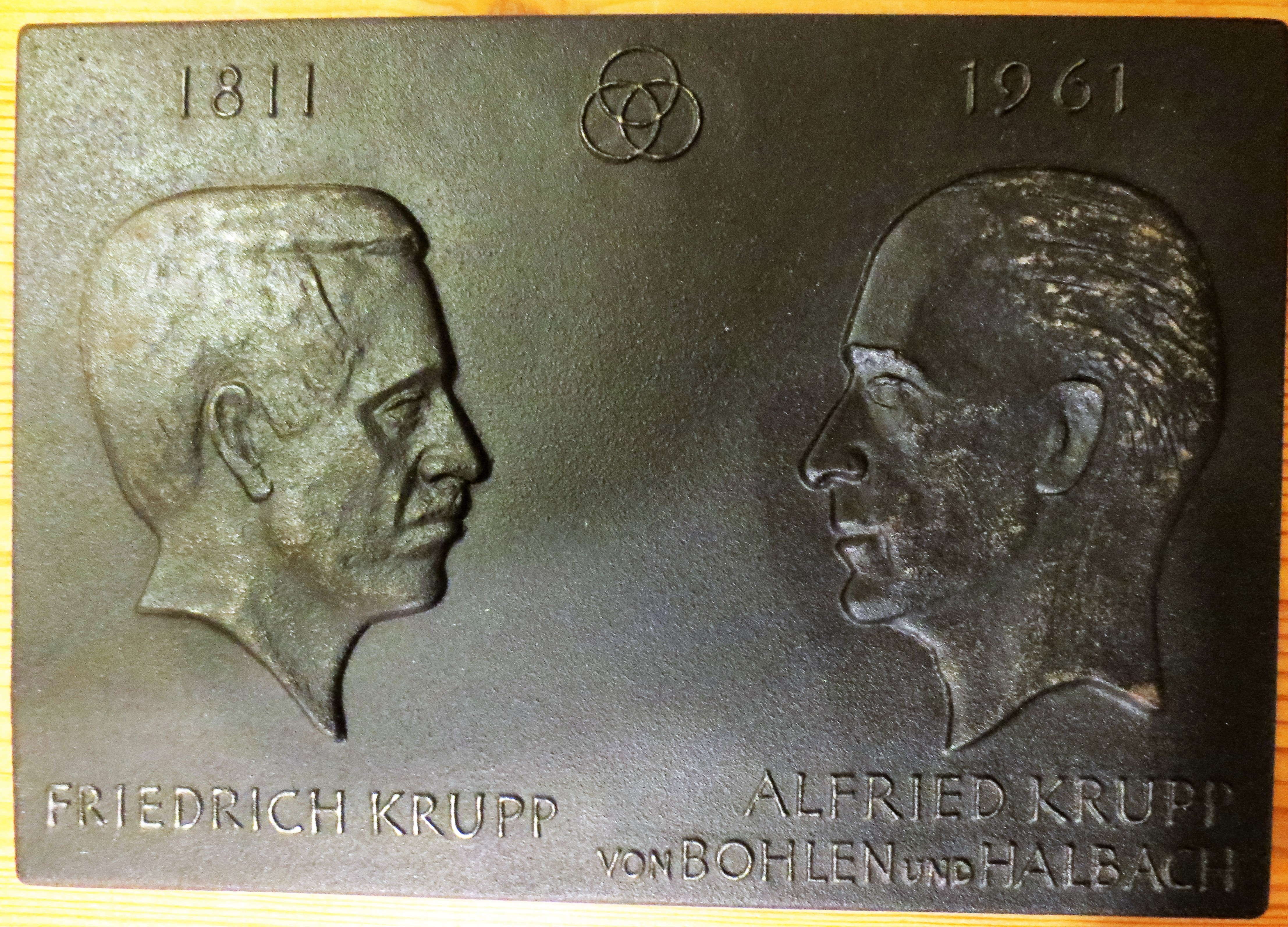 Beispiel für die Kunstgussfertigung der Friedrichshütte bei Laasphe 1961.